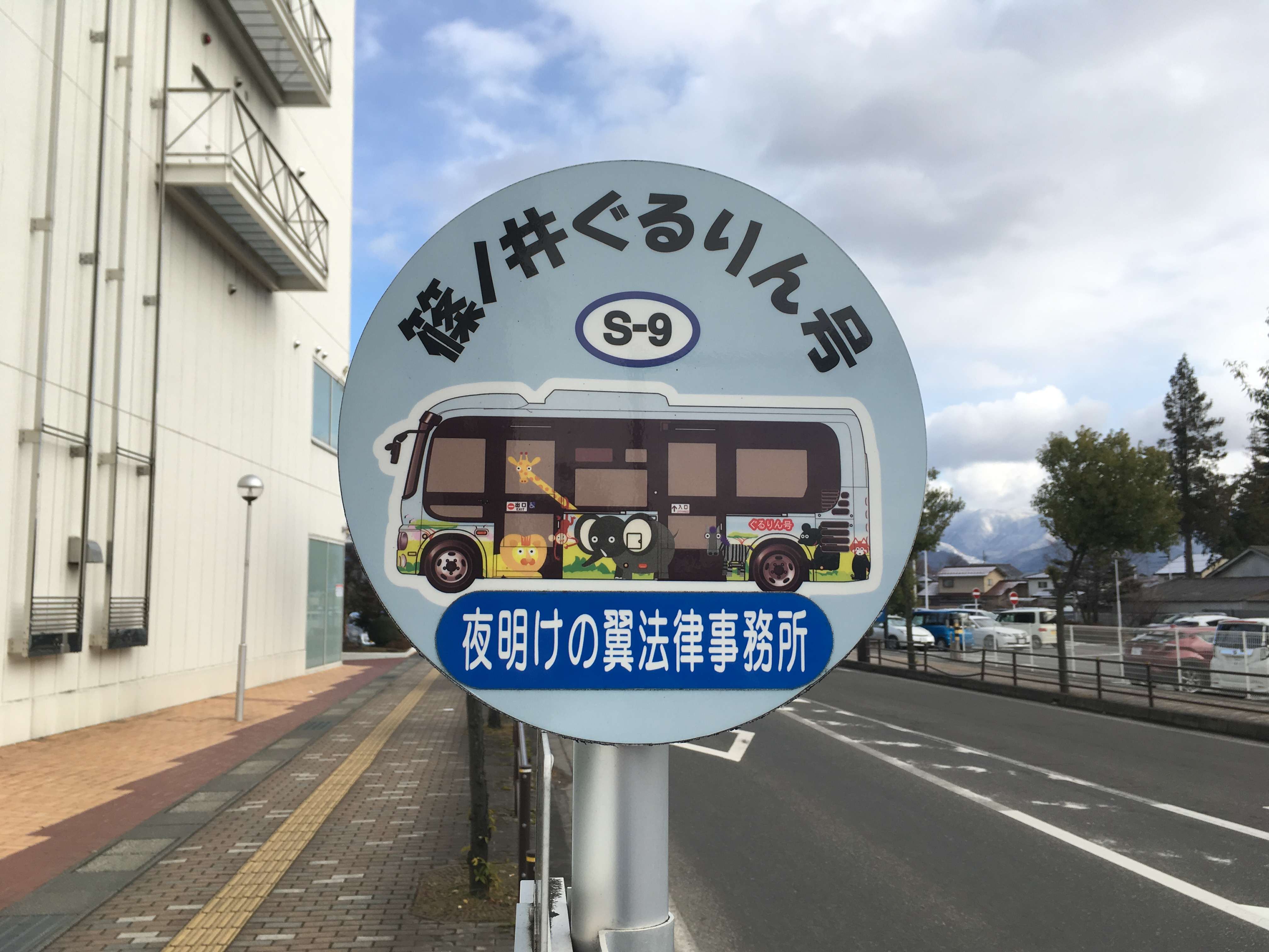 篠ノ井ぐるりん号の車両が描かれたバス停